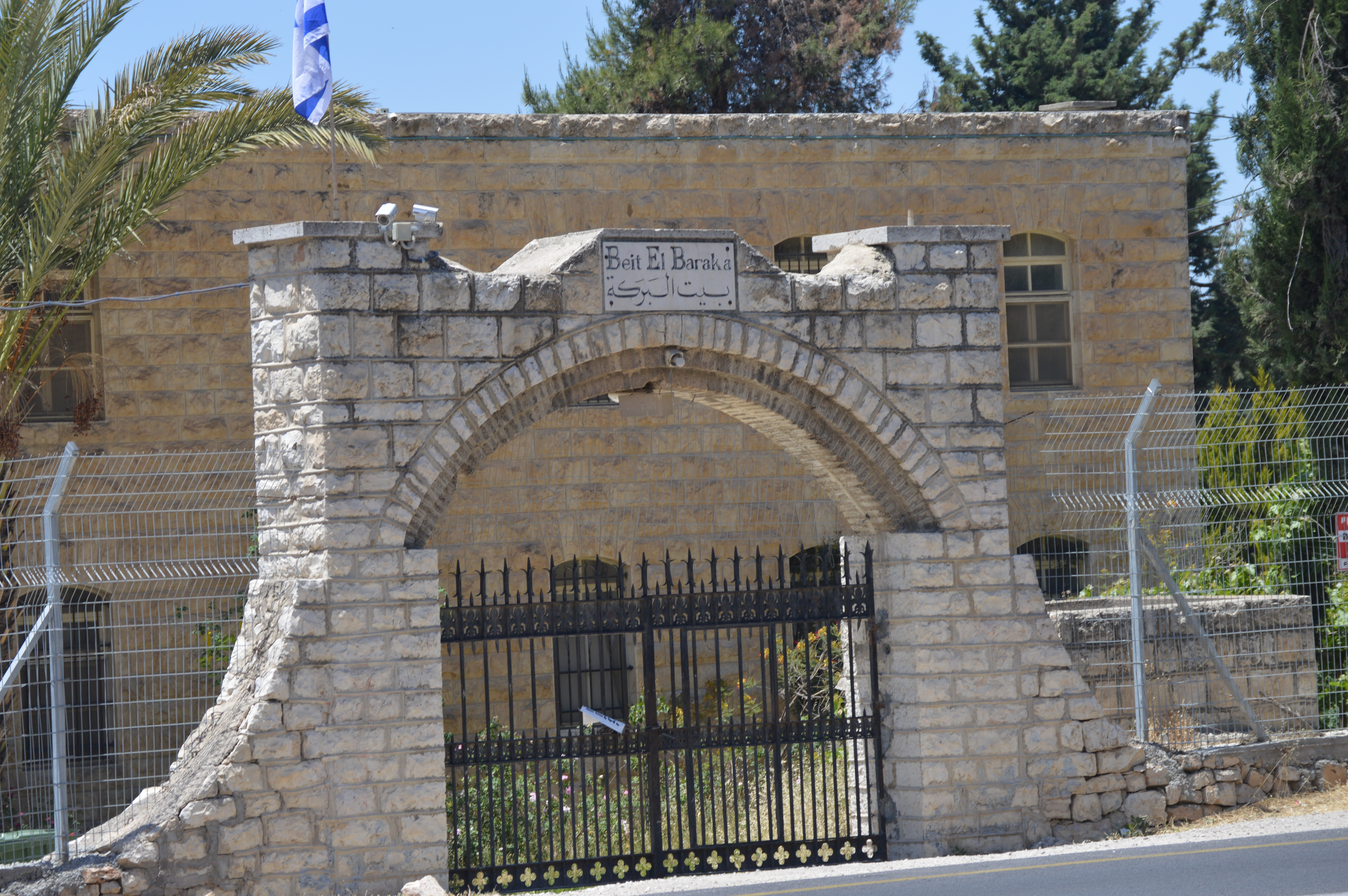 בית הברכה, שער מזרחי